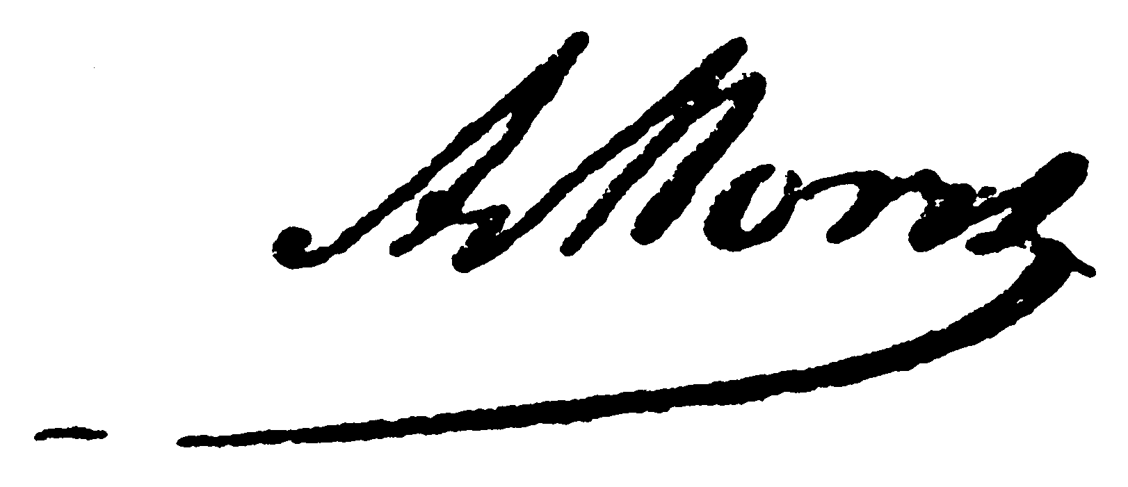 Dem Alexandre Moris seng Ënnerschrëft (1850) (signature).